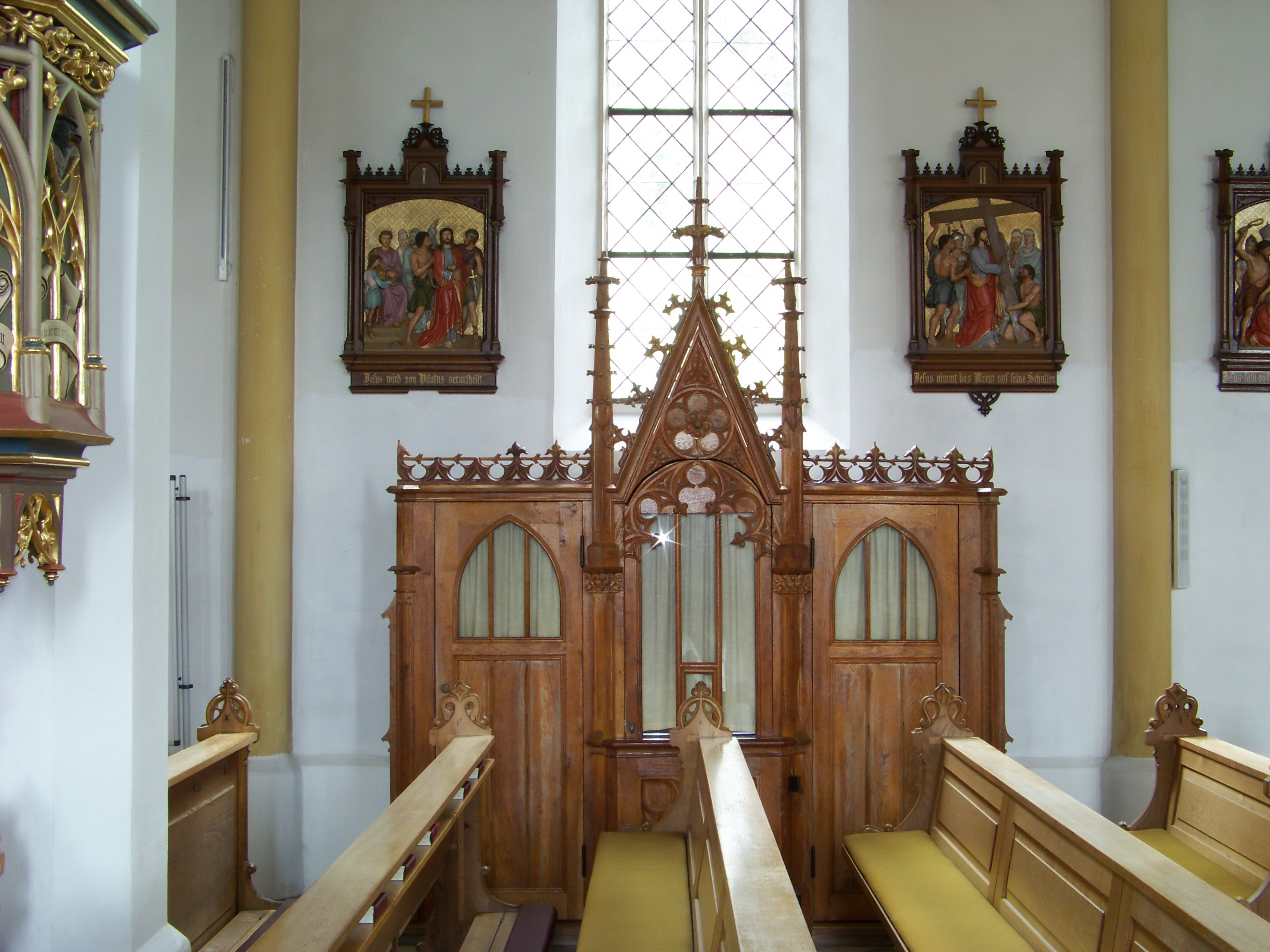 Rottenburg an der Laaber. Katholische Pfarrkirche St. Georg. Neugotischer Beichtstuhl zwischen zwei Relief-Kreuzwerktafeln.